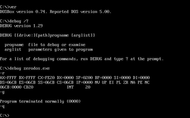 Debug 1.29 in action under DOSBox 0.74